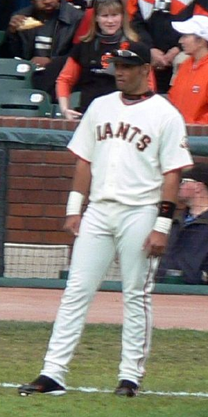 Pedro Feliz